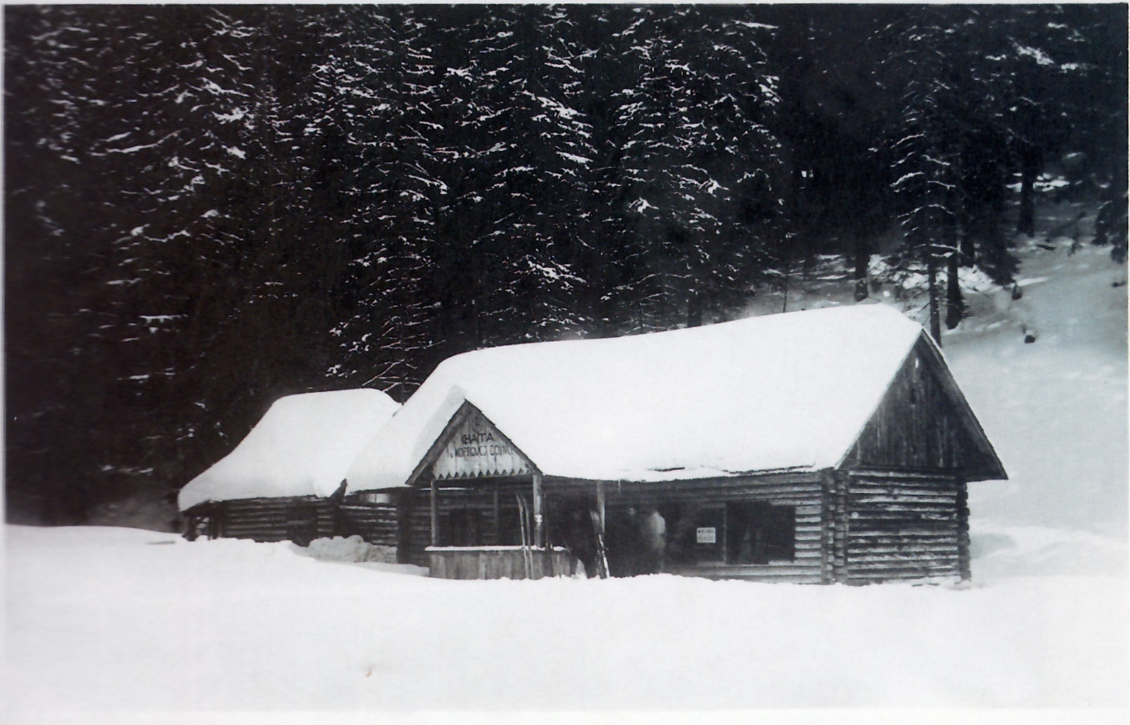 Pri Kôprovskom potoku v Kôprovej doline vo Vysokých Tatrách stála v roku 1925 Muhlmannova chata.